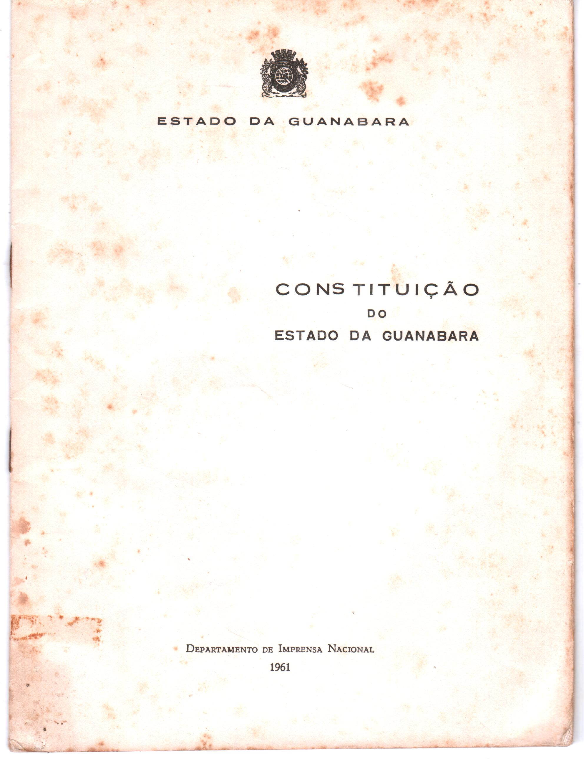 Capa da Constituição do Estado da Guanabara em impressão feita pela Imprensa Nacional em 1961.